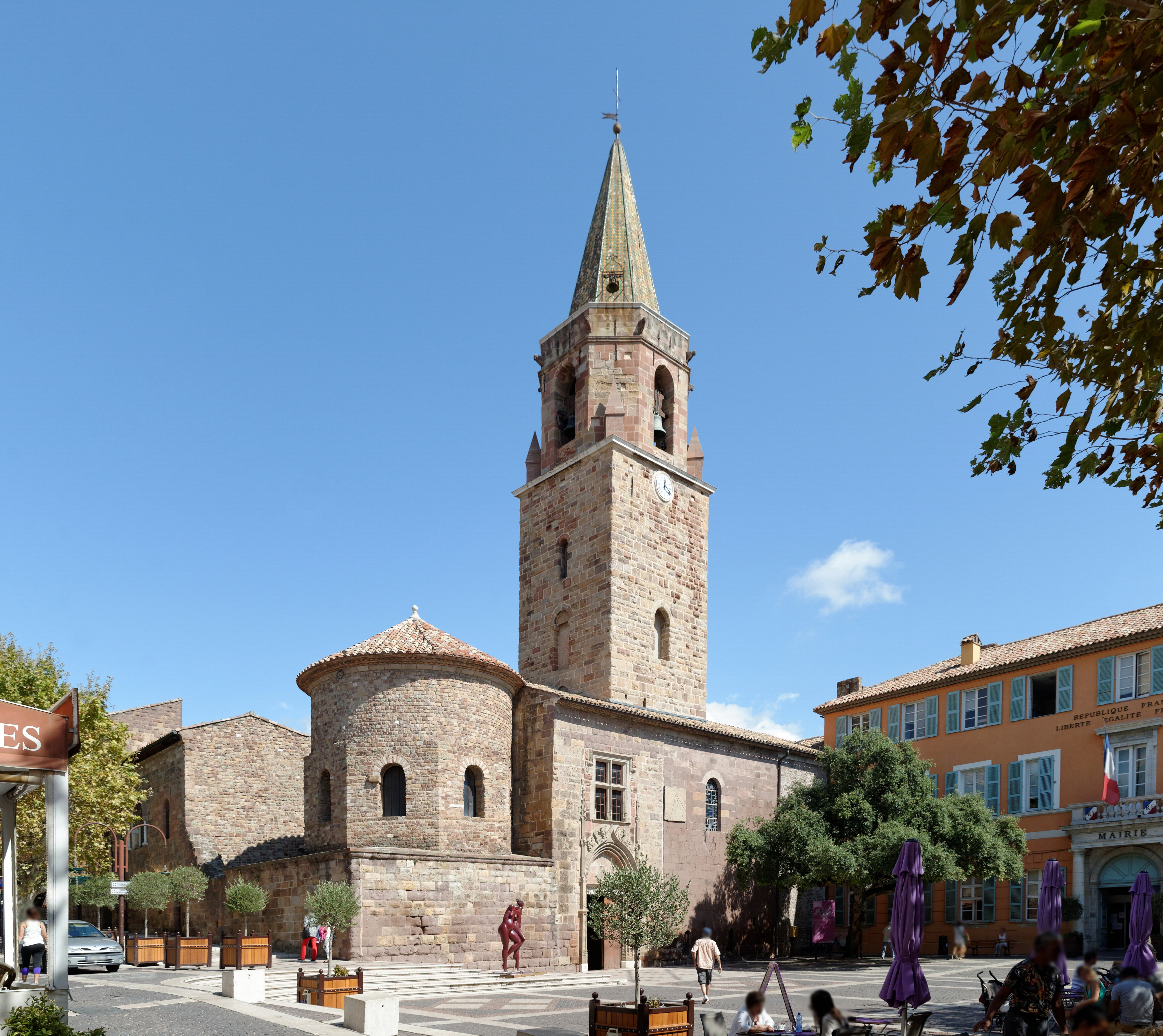 Cathédrale Saint Léonce (Fréjus, Var, France) .